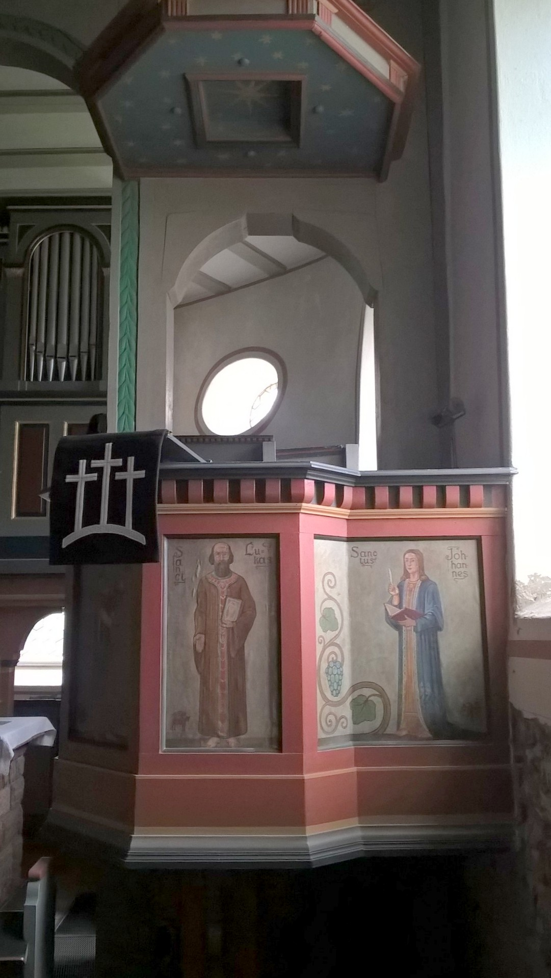 Evangelische Kirche Stangenrod, Grünberg, Landkreis Gießen, Hessen, Deutschland